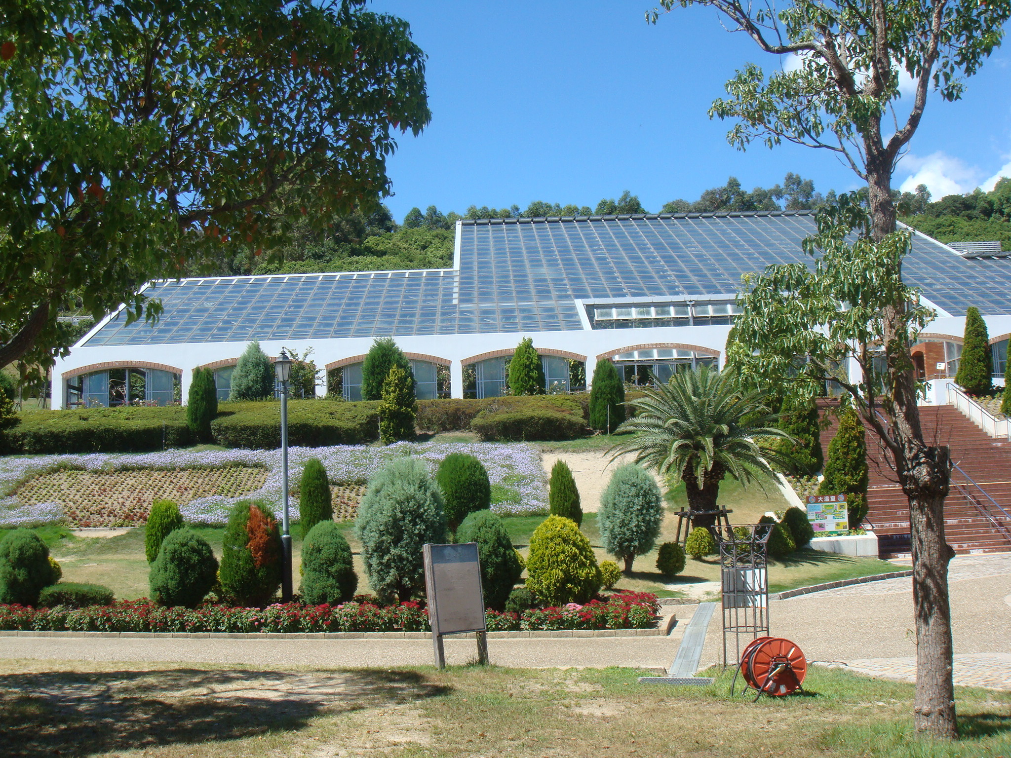 淡路ファームパークイングランドの丘